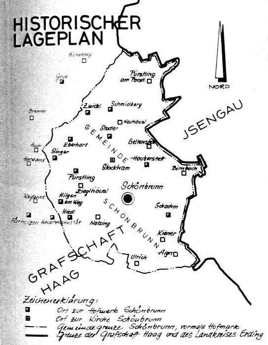 Hofmark bzw. Gemeinde_Schönbrunn